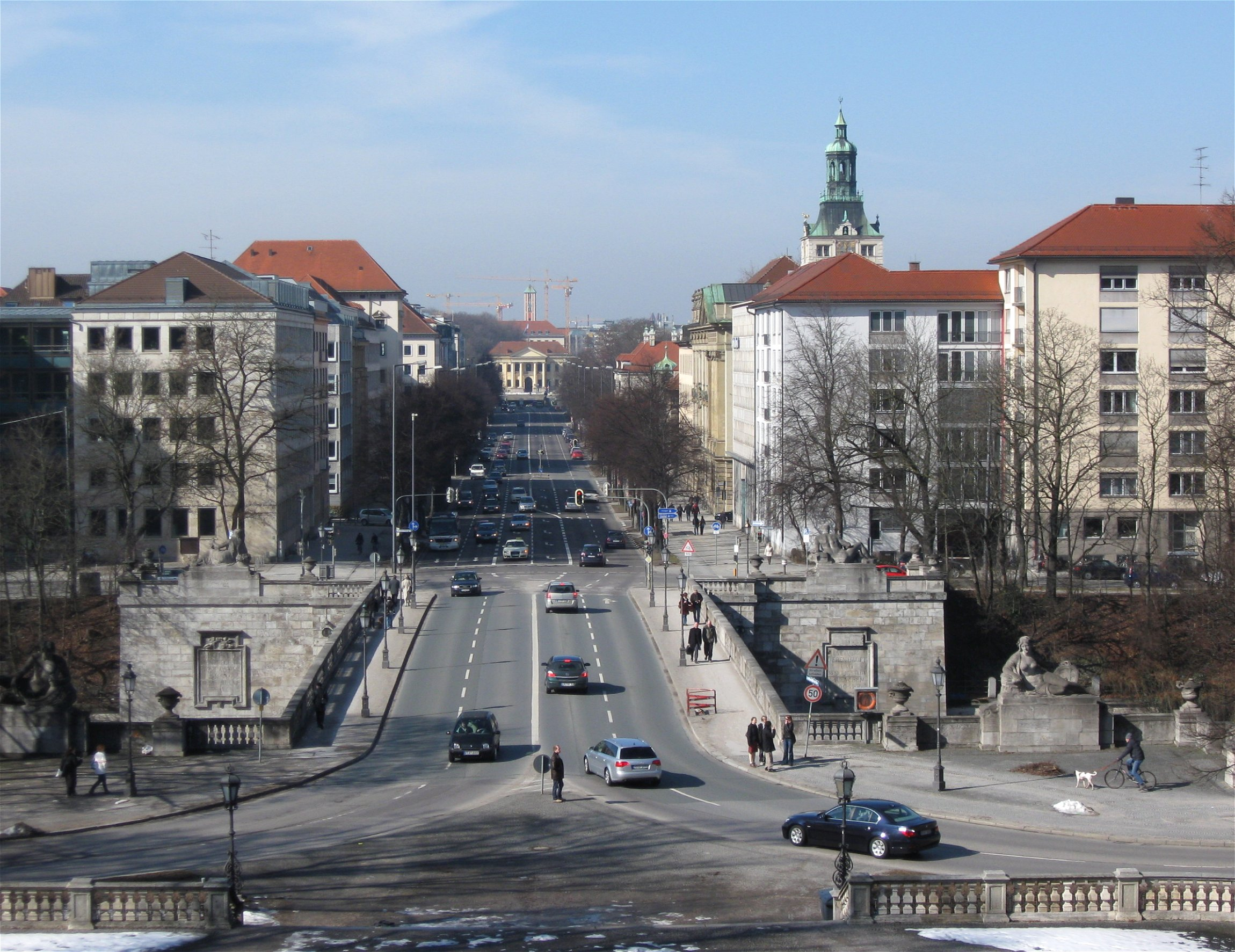 Prinzregentenstraße, München, vom Friedensengel nach Westen gesehen